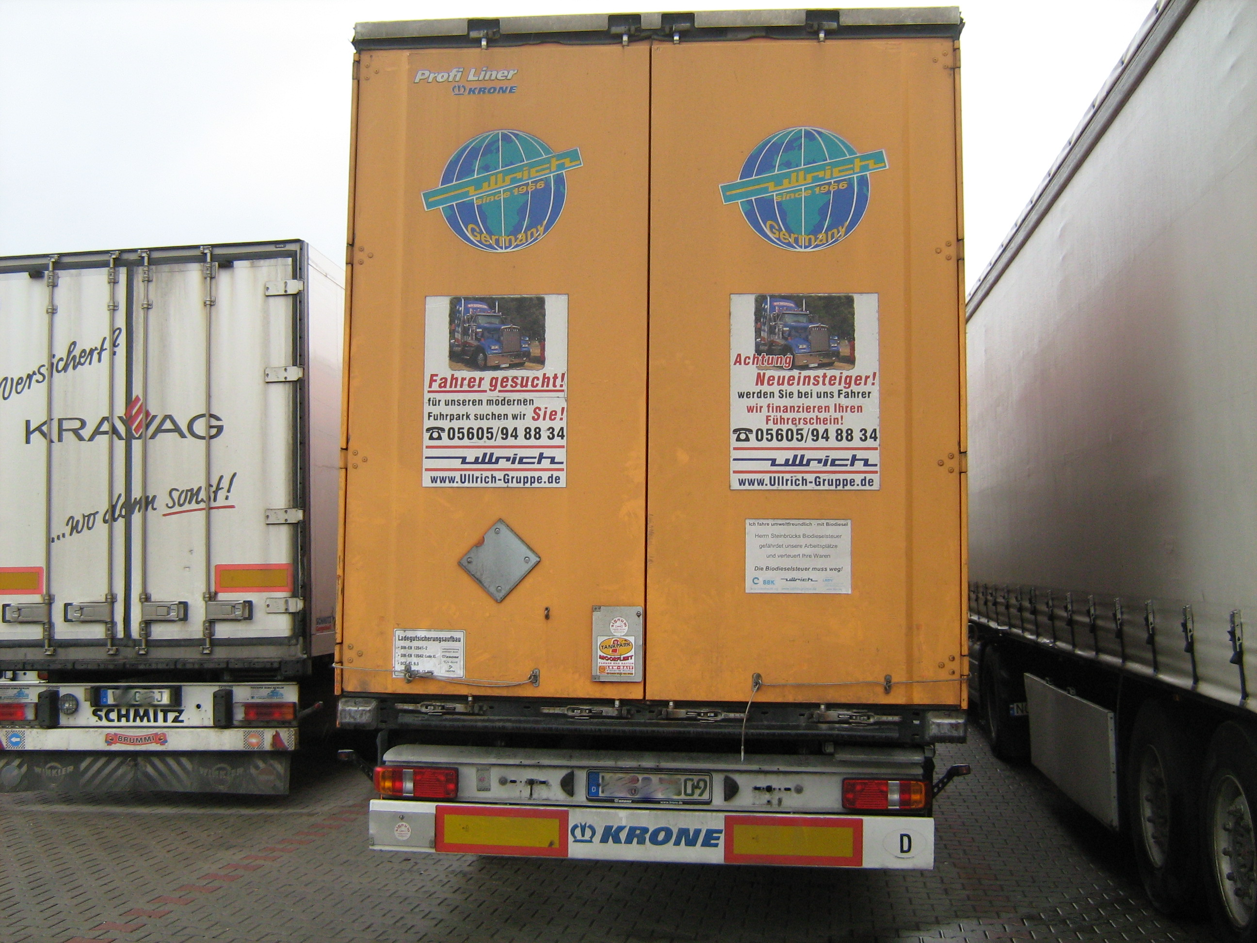 Reklame um Fernfahrer zu finden, in den Jahren 2008 - 2010